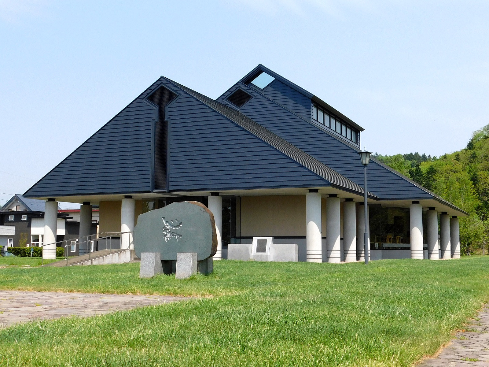 北海道天塩郡幌延町にある金田心象書道美術館外観